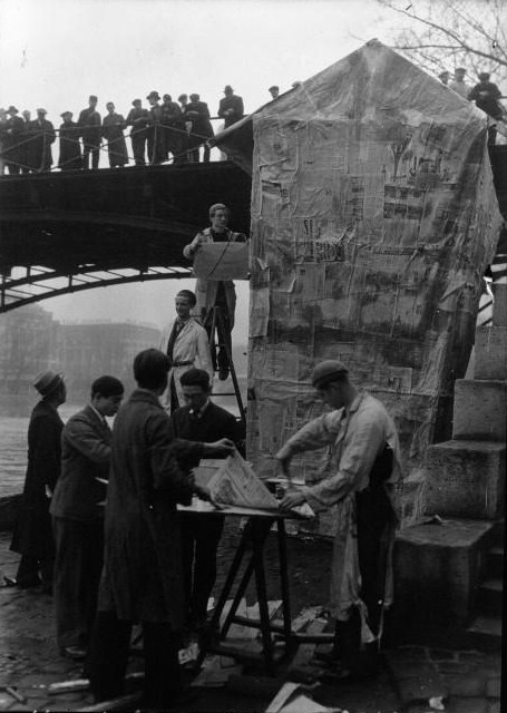 En 1933, à Paris, en bord de Seine, près du Pont des Arts, les élèves des Beaux-Arts construisent un char pour le cortège de la Balade du Rougevin. - Cliché Agence Mondiale.